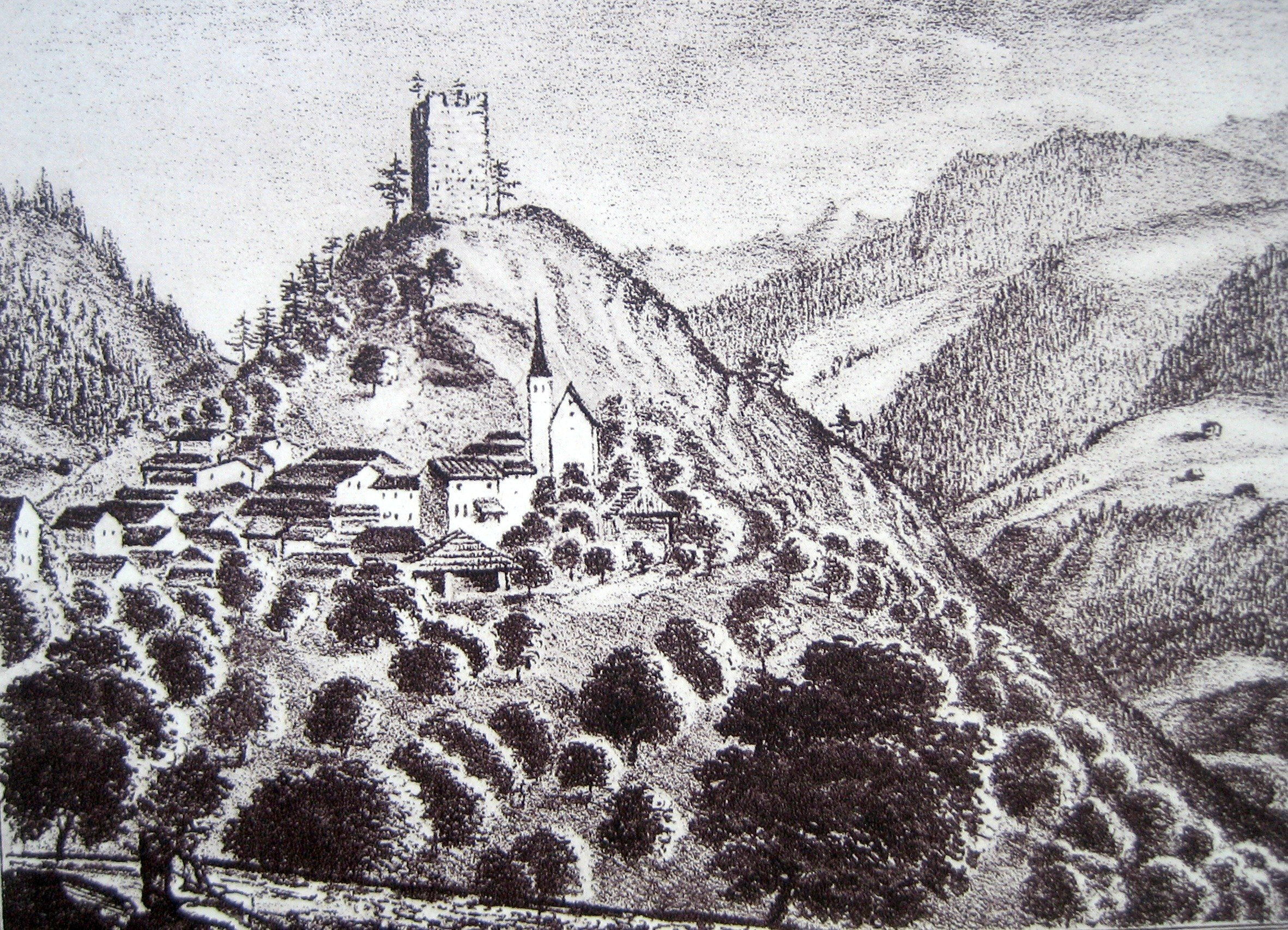 Ruine Hohentrins auf einer Zeichnung von Heinrich Kraneck, 1830